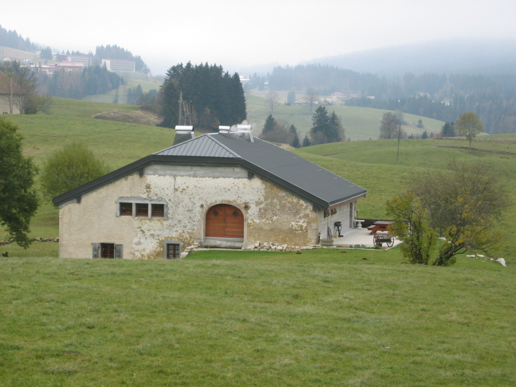 Maison typique du Haut Jura - France - Régions des Rousses